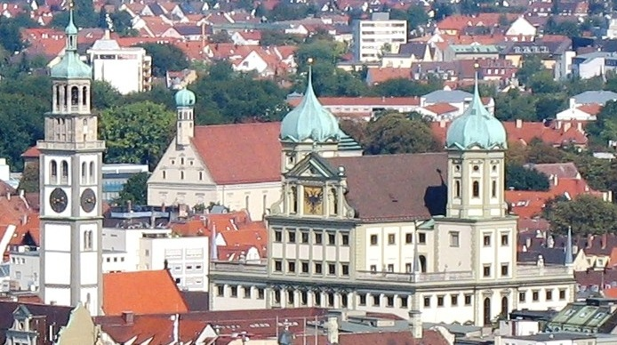 Rathaus Augsburg